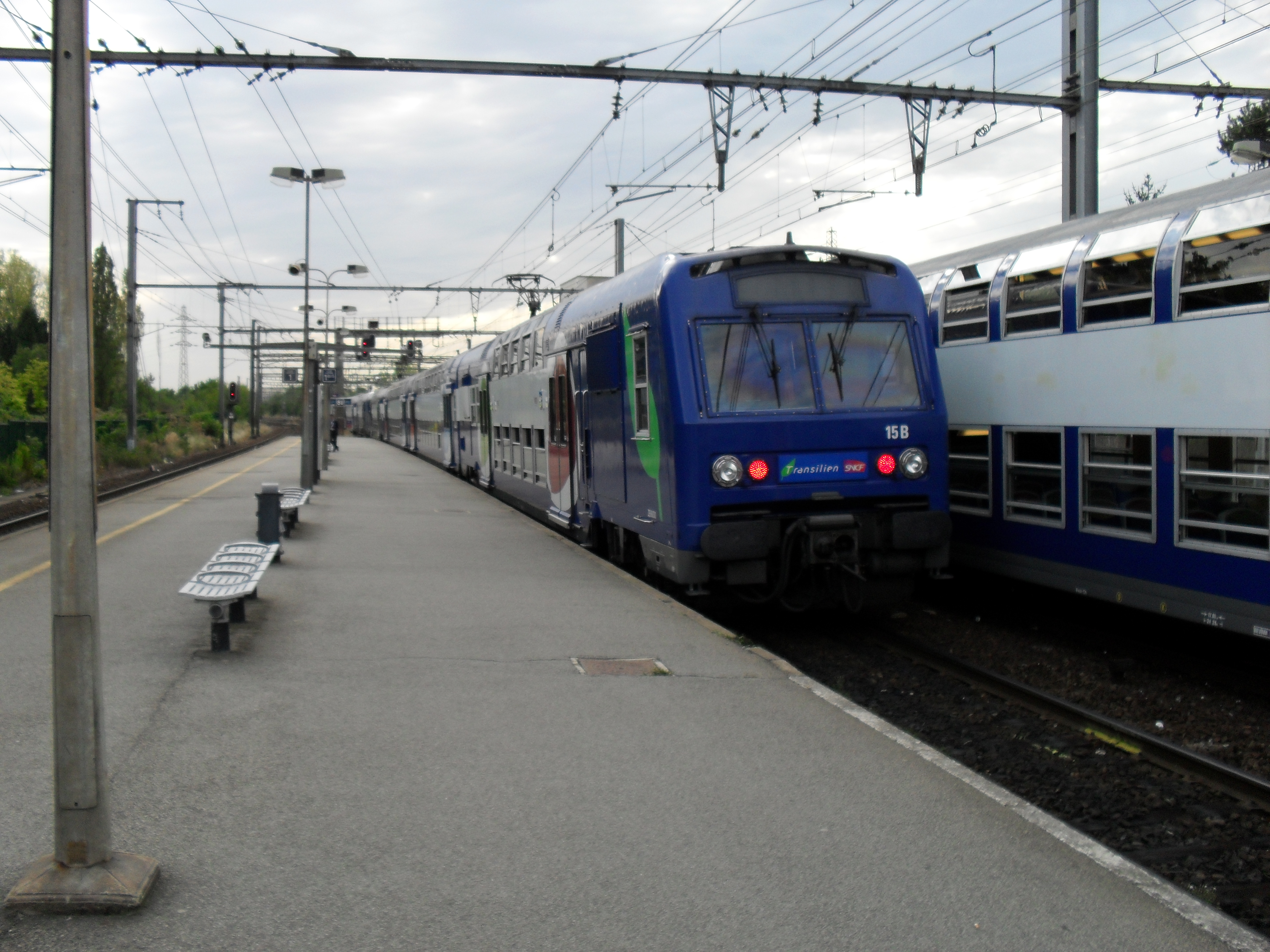 Gare de La Verrière